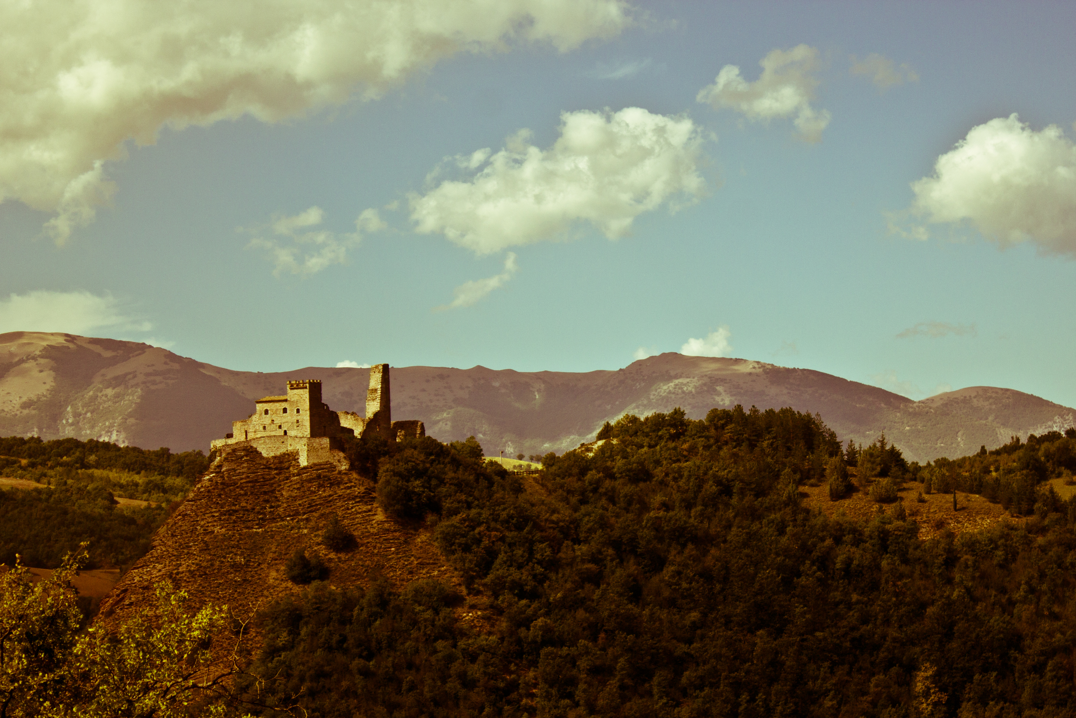 Rocca Varano This is a photo of a monument which is part of cultural heritage of Italy.